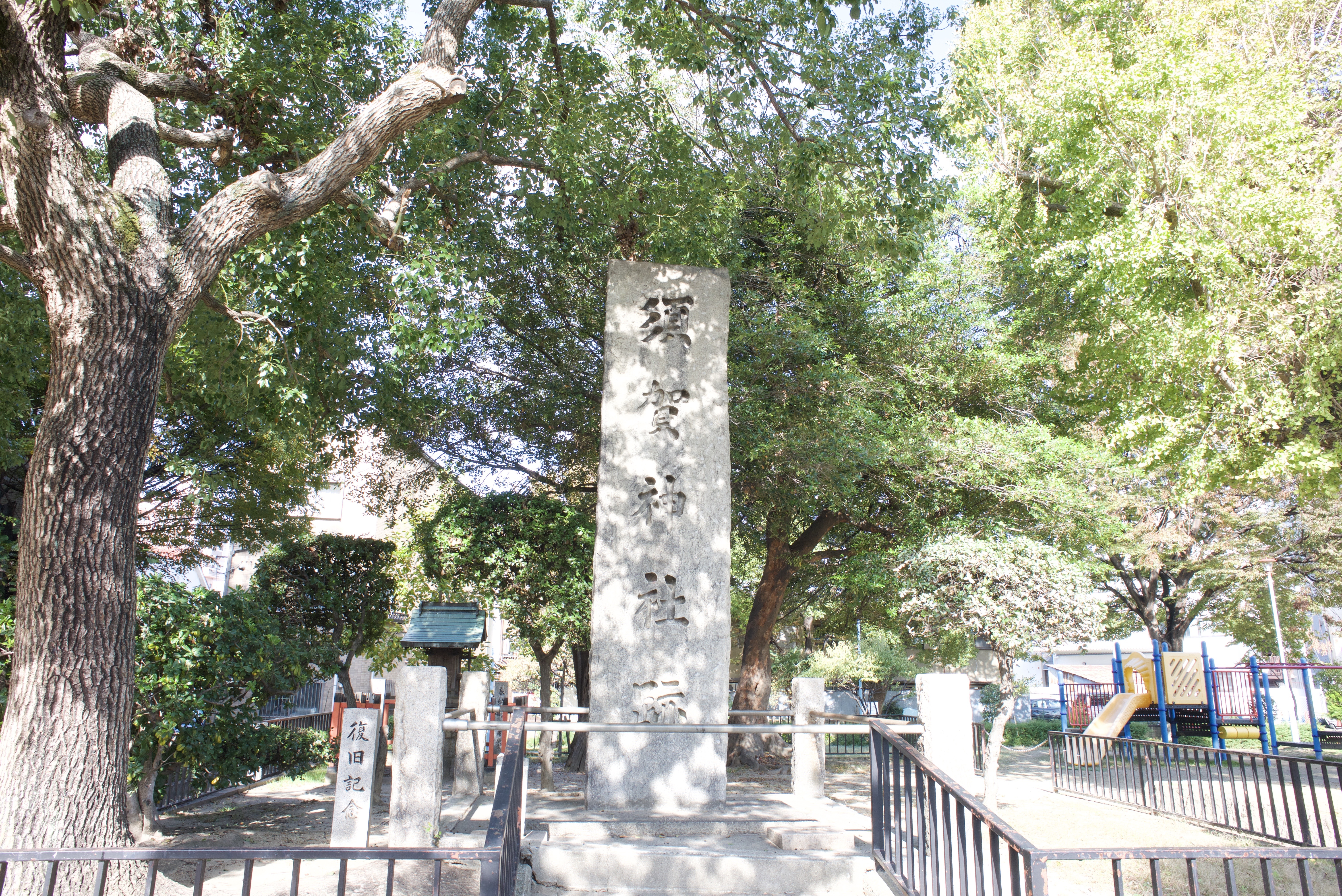 須賀森公園にある石碑